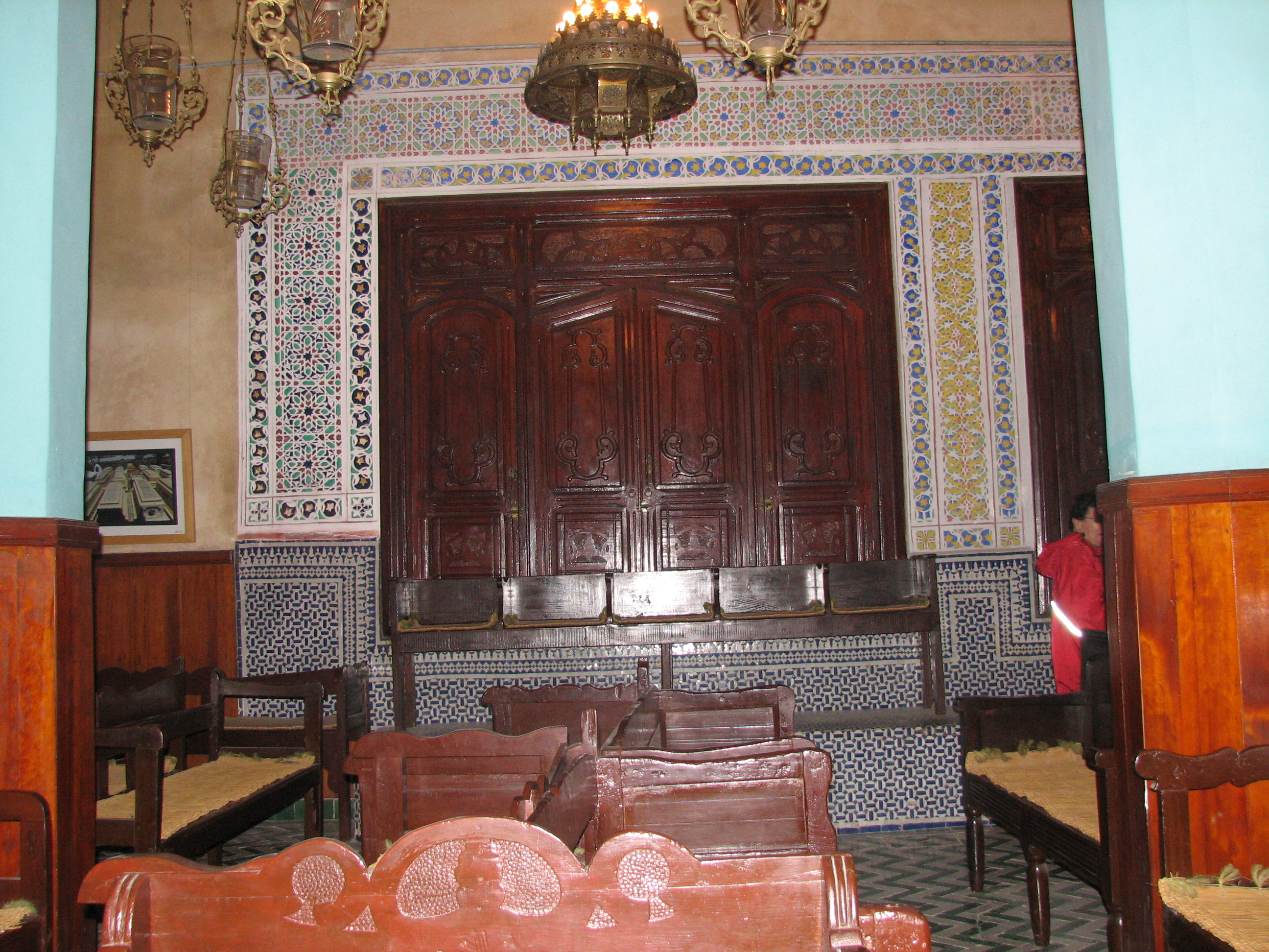 Aben Danan synagogue-Fes Morocco בית הכנסת של משפחת אבן דנאן בעיר פס במרוקו. בית לא פעיל. הפך למוזיאון בשנת 1999. מתוחזק עד היום על ידי המשפחה המוסלמית שטיפלה בו בזמן שהיה פעיל""